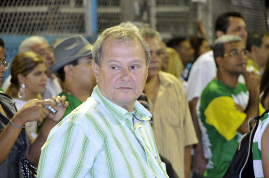 Ensaio da Imperatriz Leopoldinense no Sambódromo 2008.Foto: Ricardo Almeida.